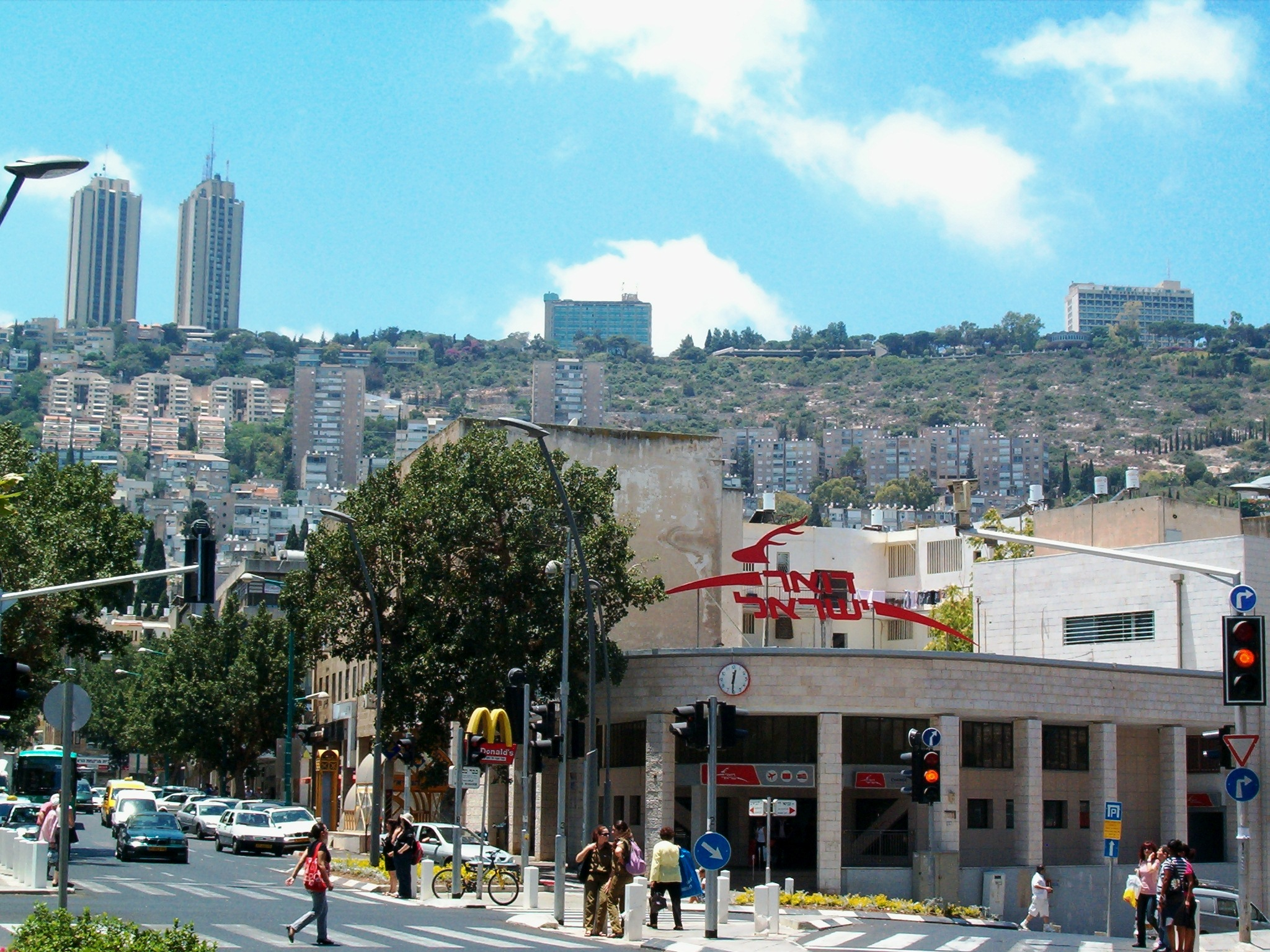 פינת הרחובות הרצל והנביאים בhe:הדר הכרמל, he:חיפה